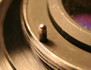 photo Jean-daniel Dodin 20051015 Catégorie:Photographie